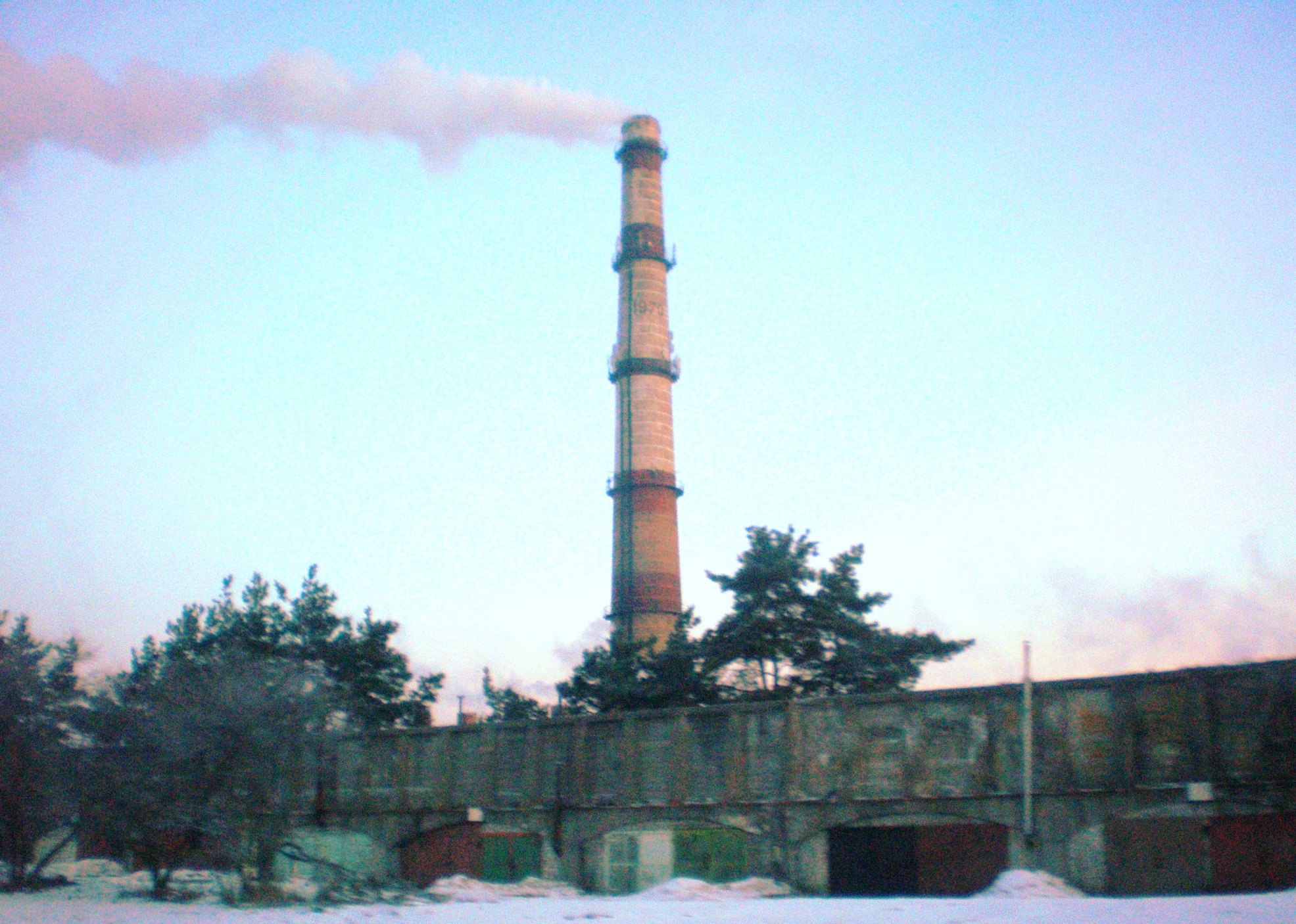 Grigiškių popieriaus fabrikas